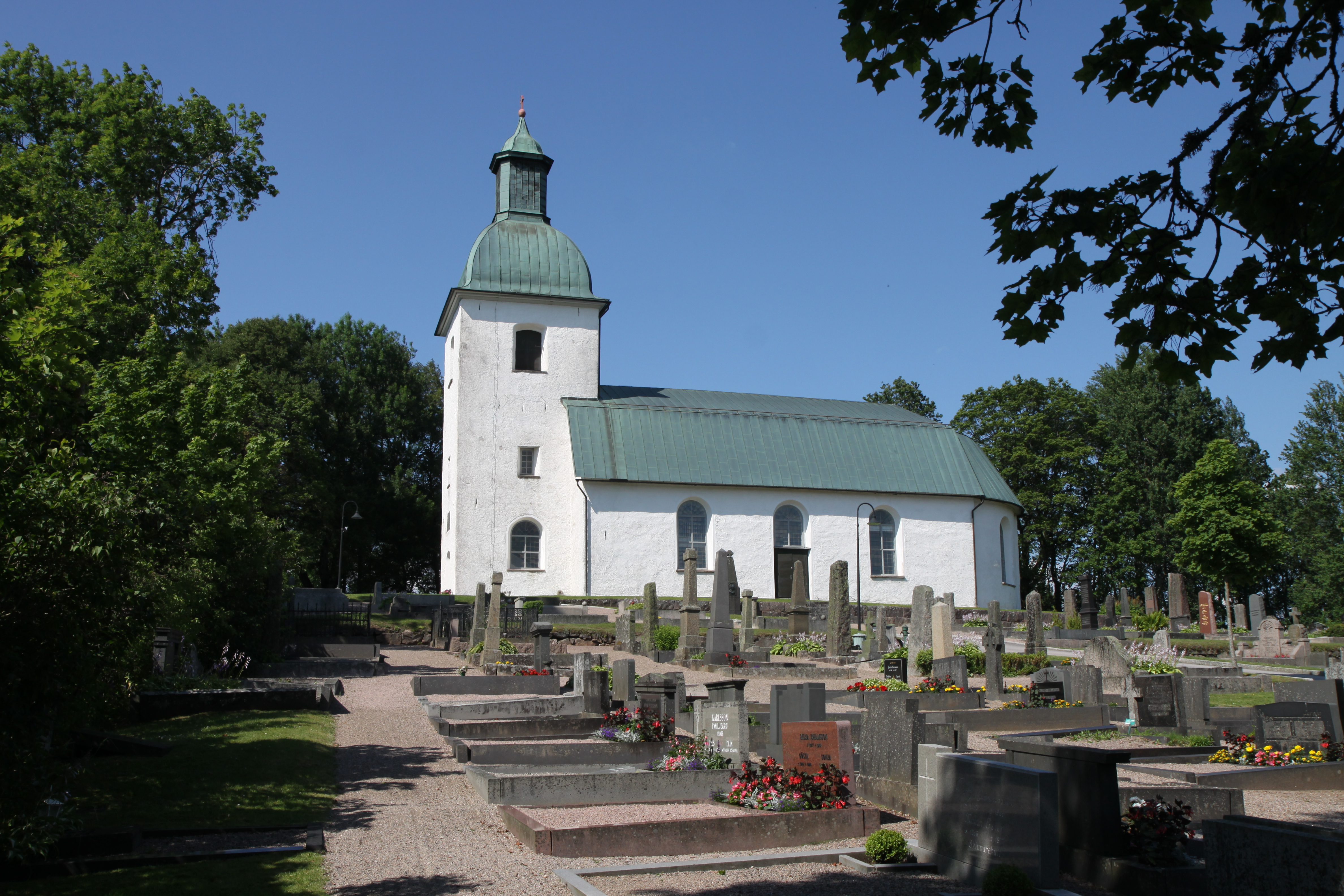 Toarps kyrka